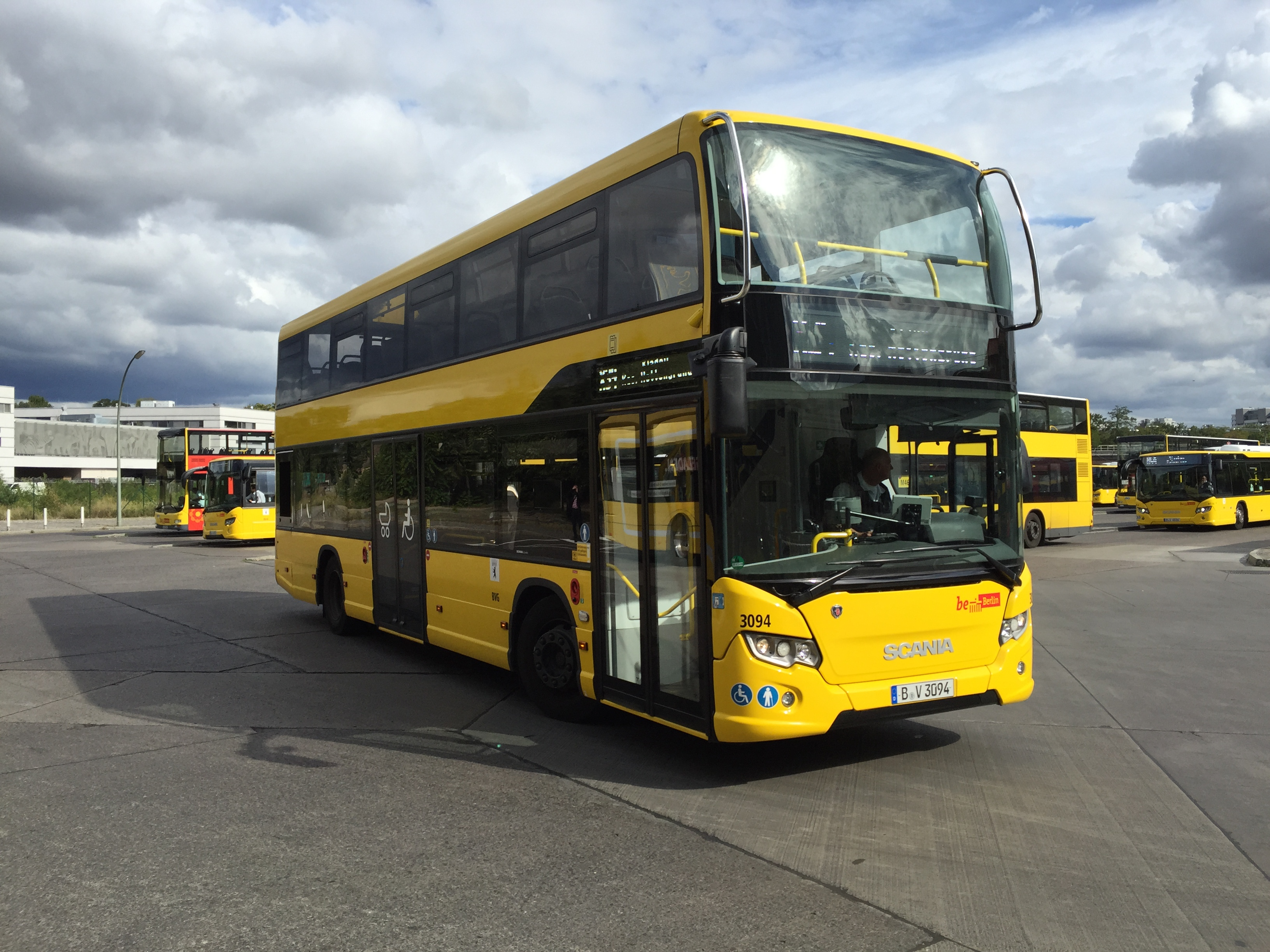 Scania Prototyp Doppeldecker Scania DN15 Citywide LF Hardenbergplatz Berlin